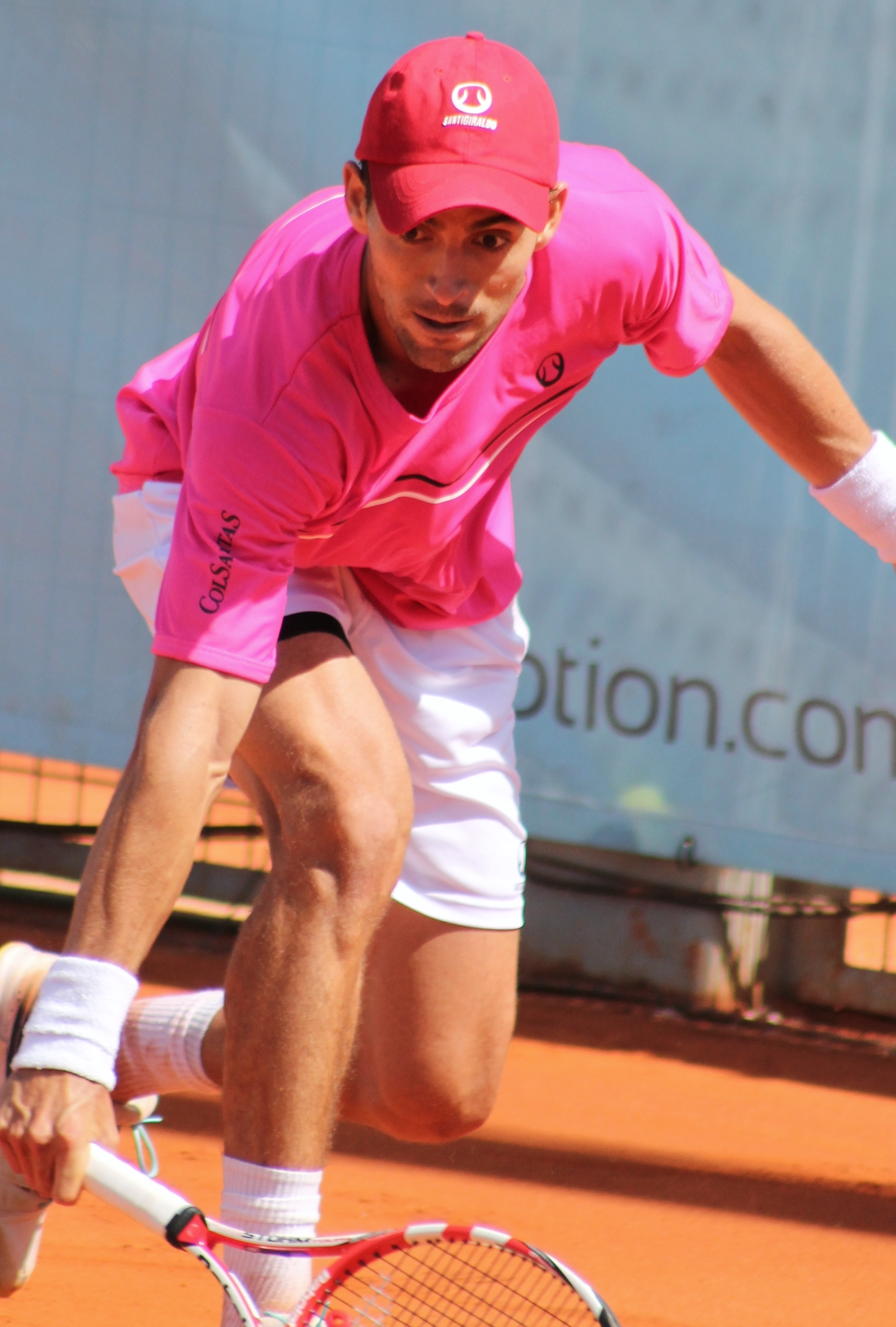 Giraldo MA14 (18) (18)